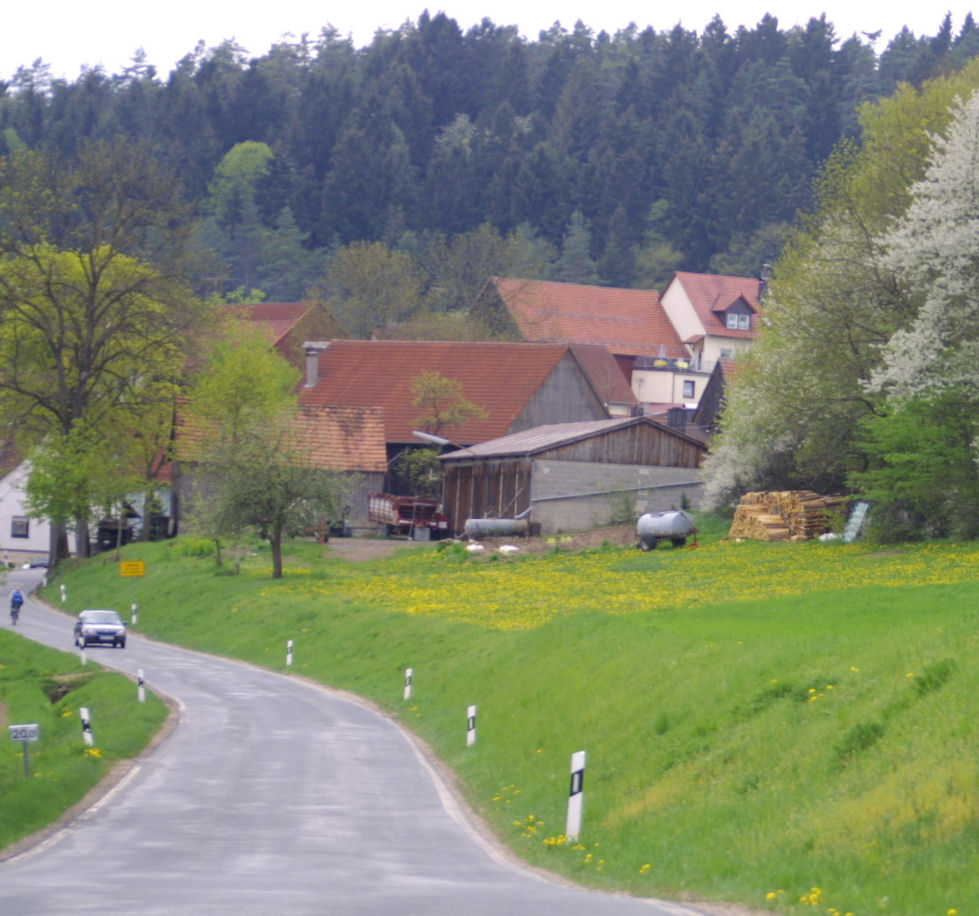 Laibarös near Bamberg (Franconia)